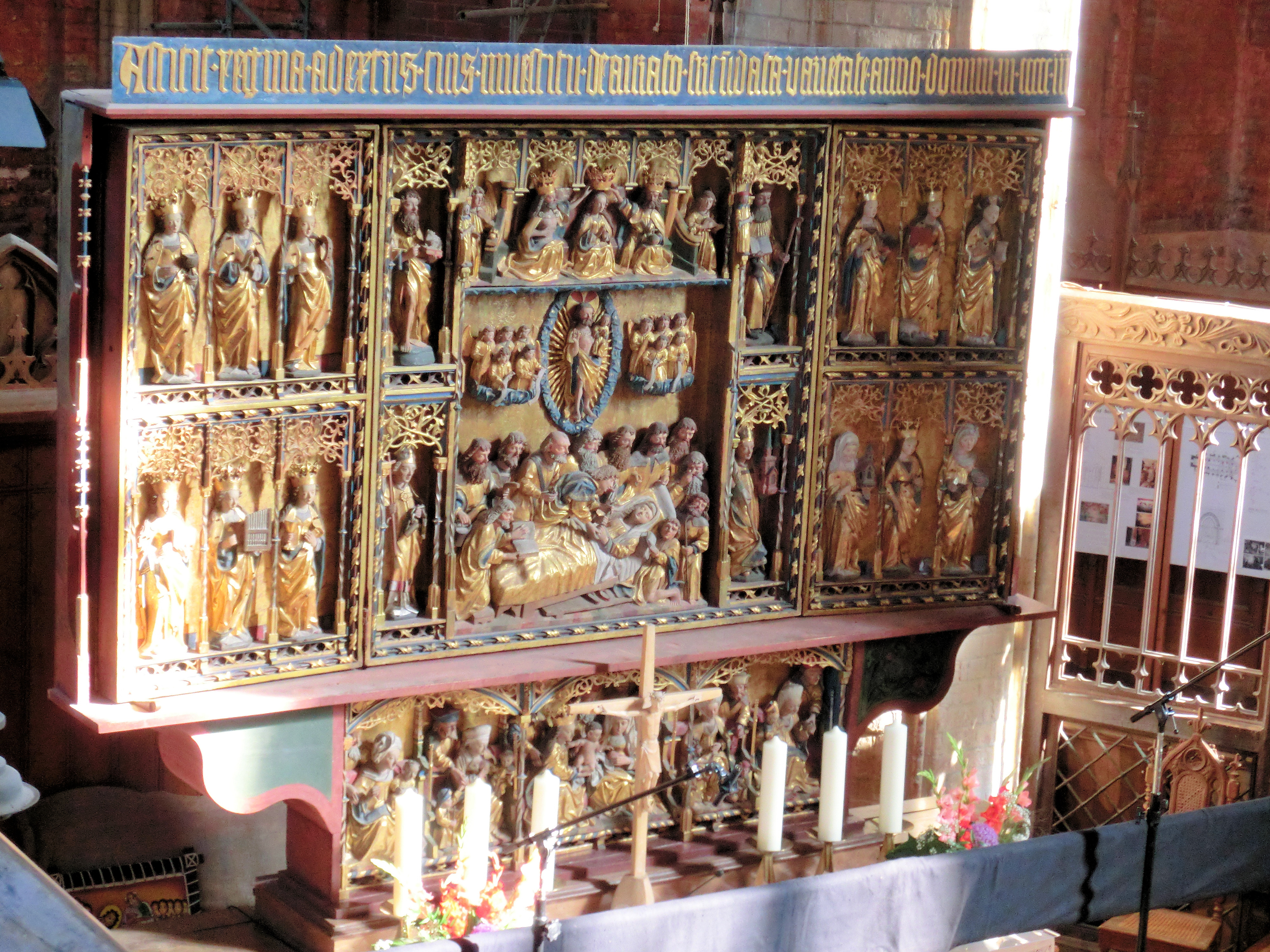 Bützow Stiftskirche Altar